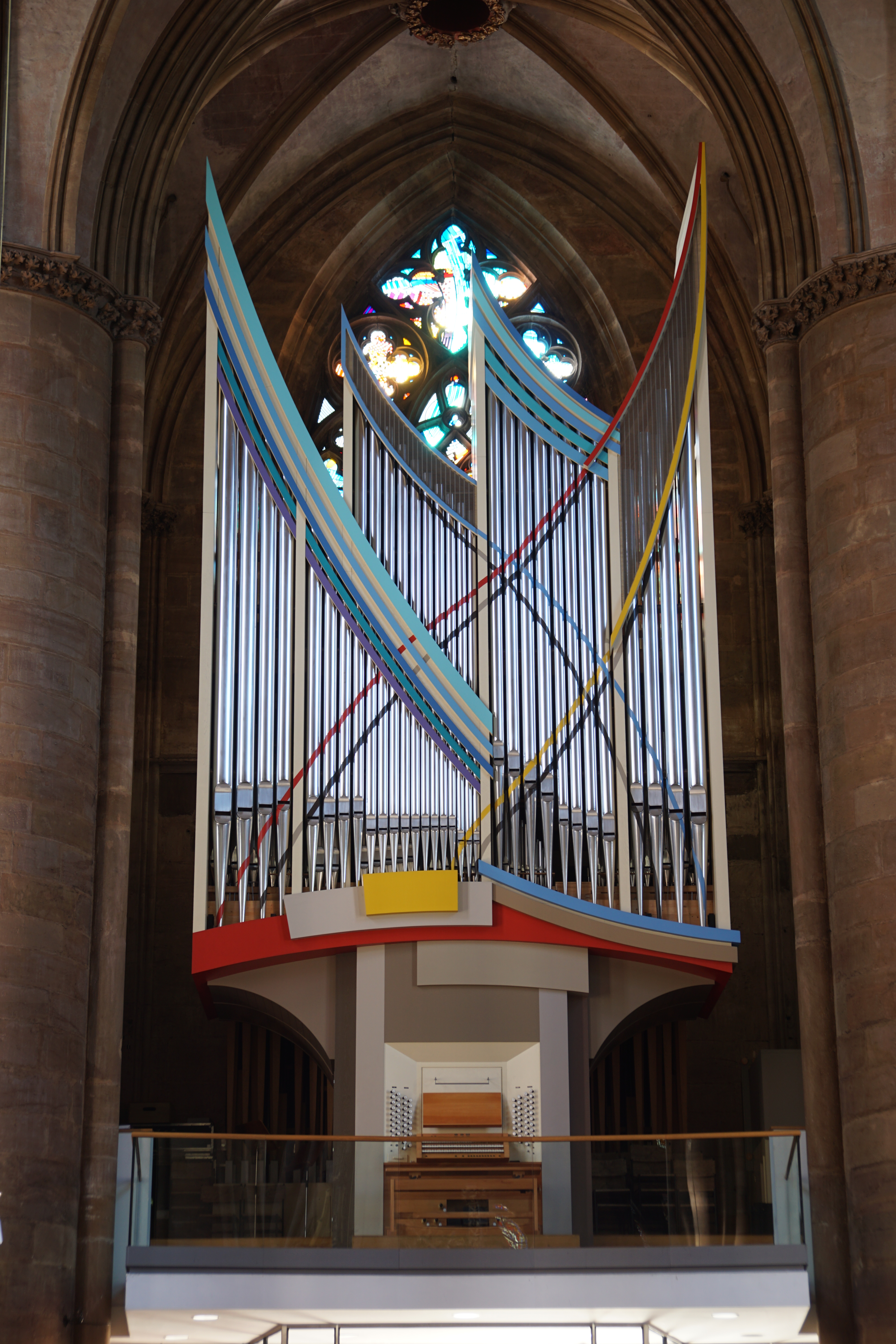 Siehe Dateiname